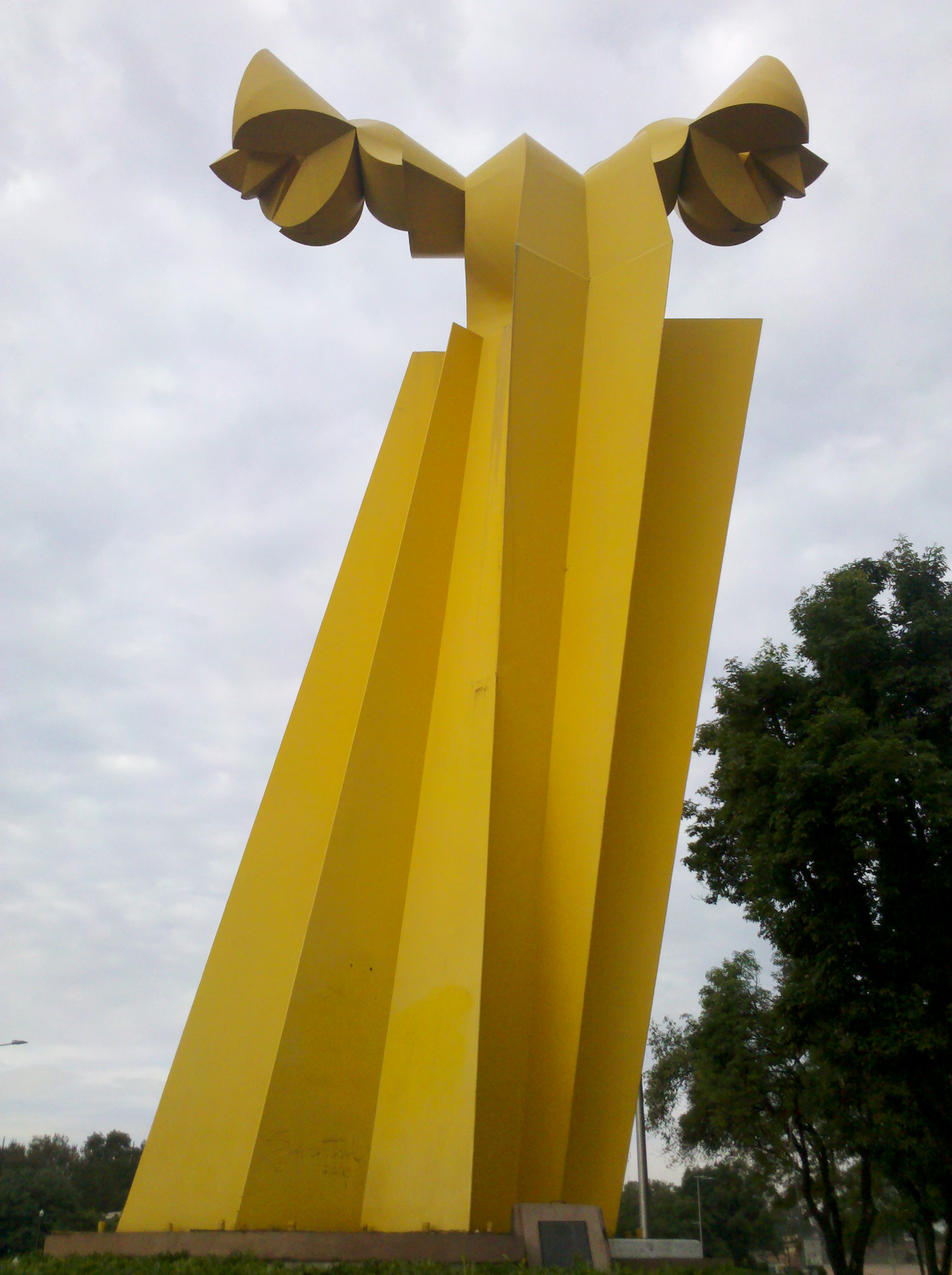 Ángel Custodio, Puebla, México. Erigido en noviembre de 2003. Boulevard 5 de mayo entre Juan de Palafox y 3 oriente.